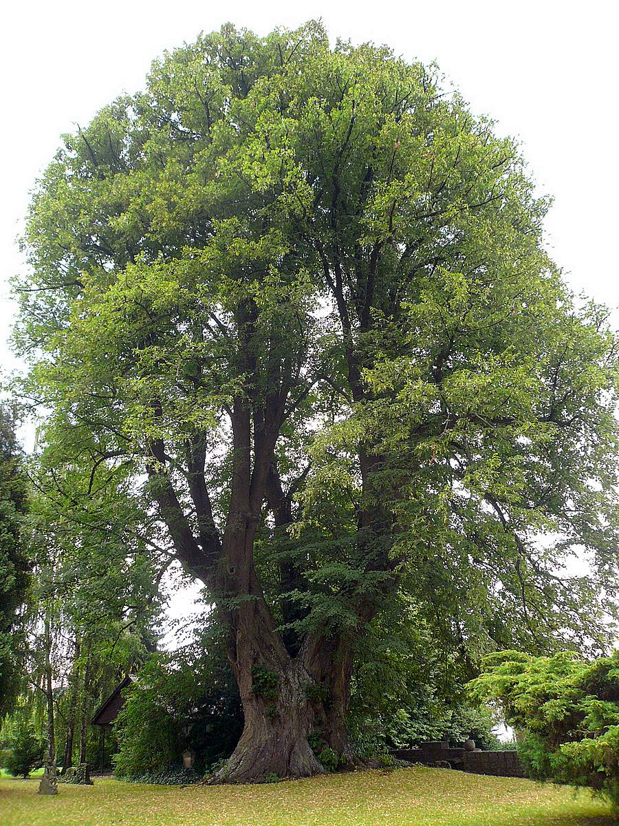 Wittekind-Linde bei Elbrinxen